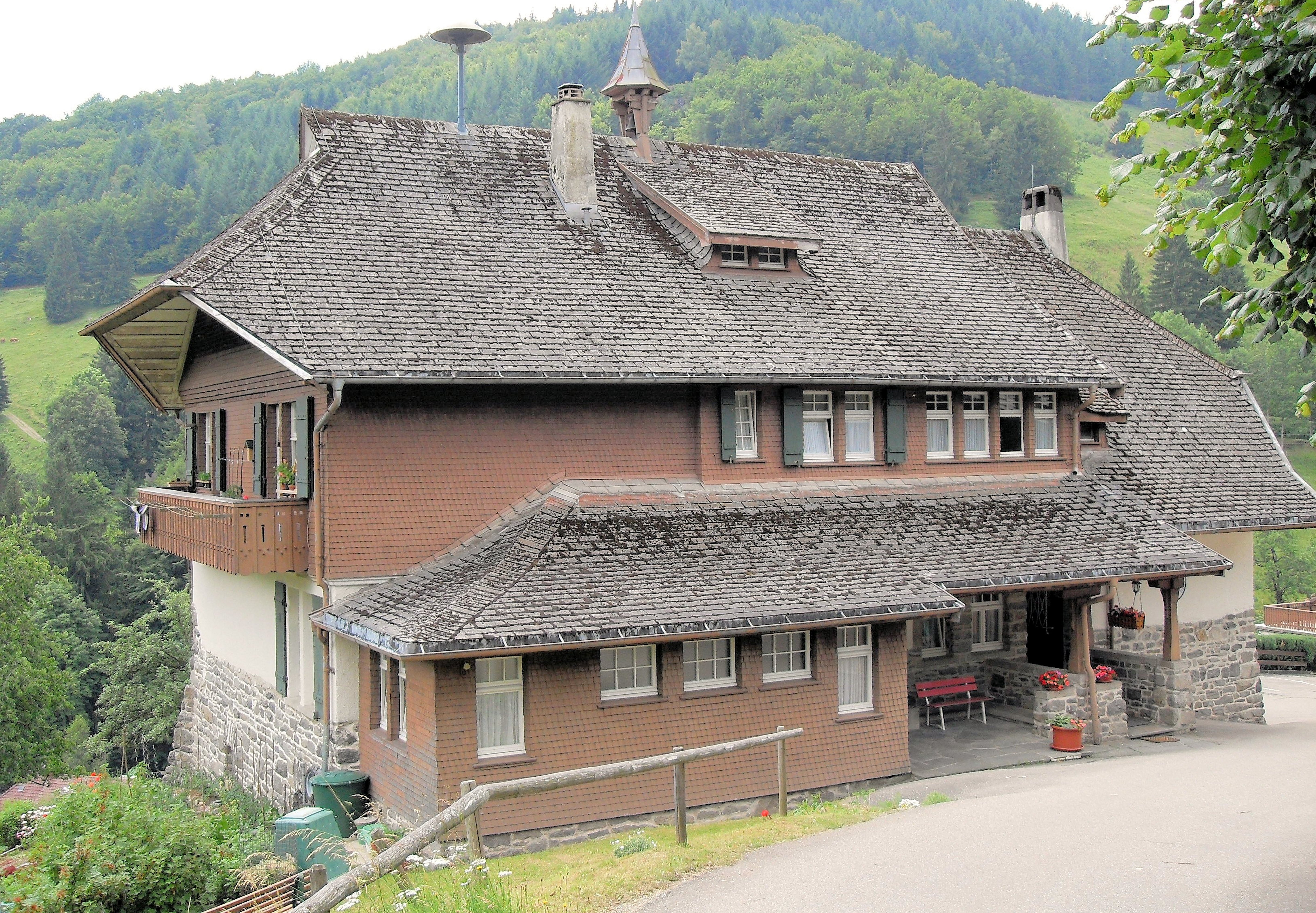 Rathaus Aitern, Schwarzwald, Deutschland